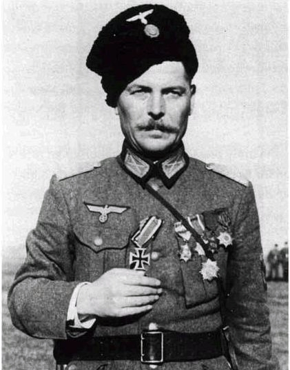 Іван Микитович Кононов (2 квітня 1900 станиця Новомиколаївська Таганрозького округу Області Війська Донського (за іншими даними, 1906) - 11 вересень 1967 Австралія) - колабораціоніст, генерал-майор Збройних Сил Комітету визволення народів Росії.